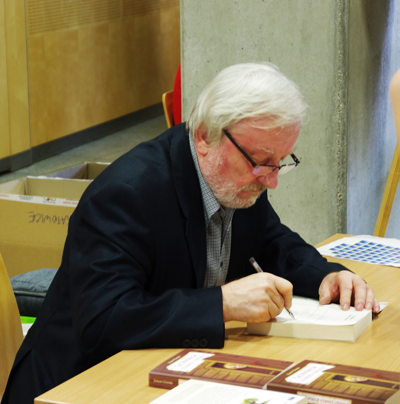 Zenon Gierała, w czasie Wielkiej Zabawy Rodzinnej w Katowicach.